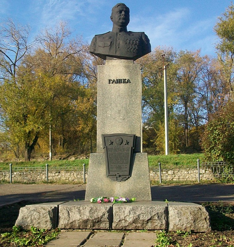 Бюст двічі Героя Радянського Союзу Д. Б. Глінки